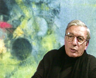 Portrait de Albert Bitran